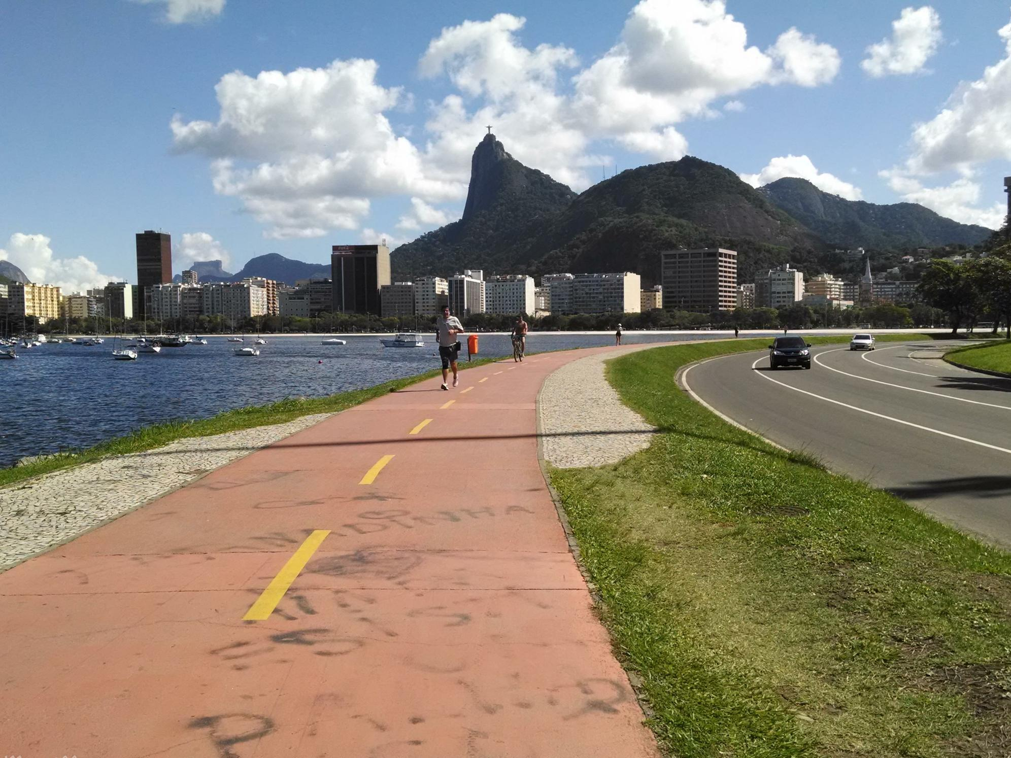 Rio de Janeiro